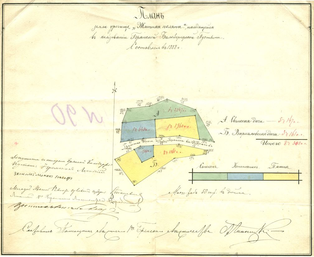 План владений Белобережской пустыни в урочище Житная Поляна.